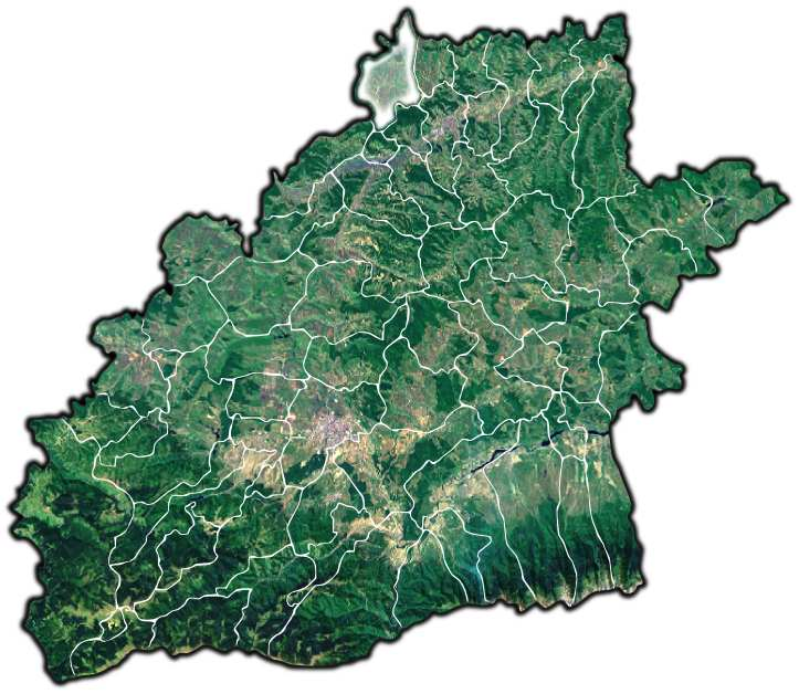 Bazna jud Sibiu.